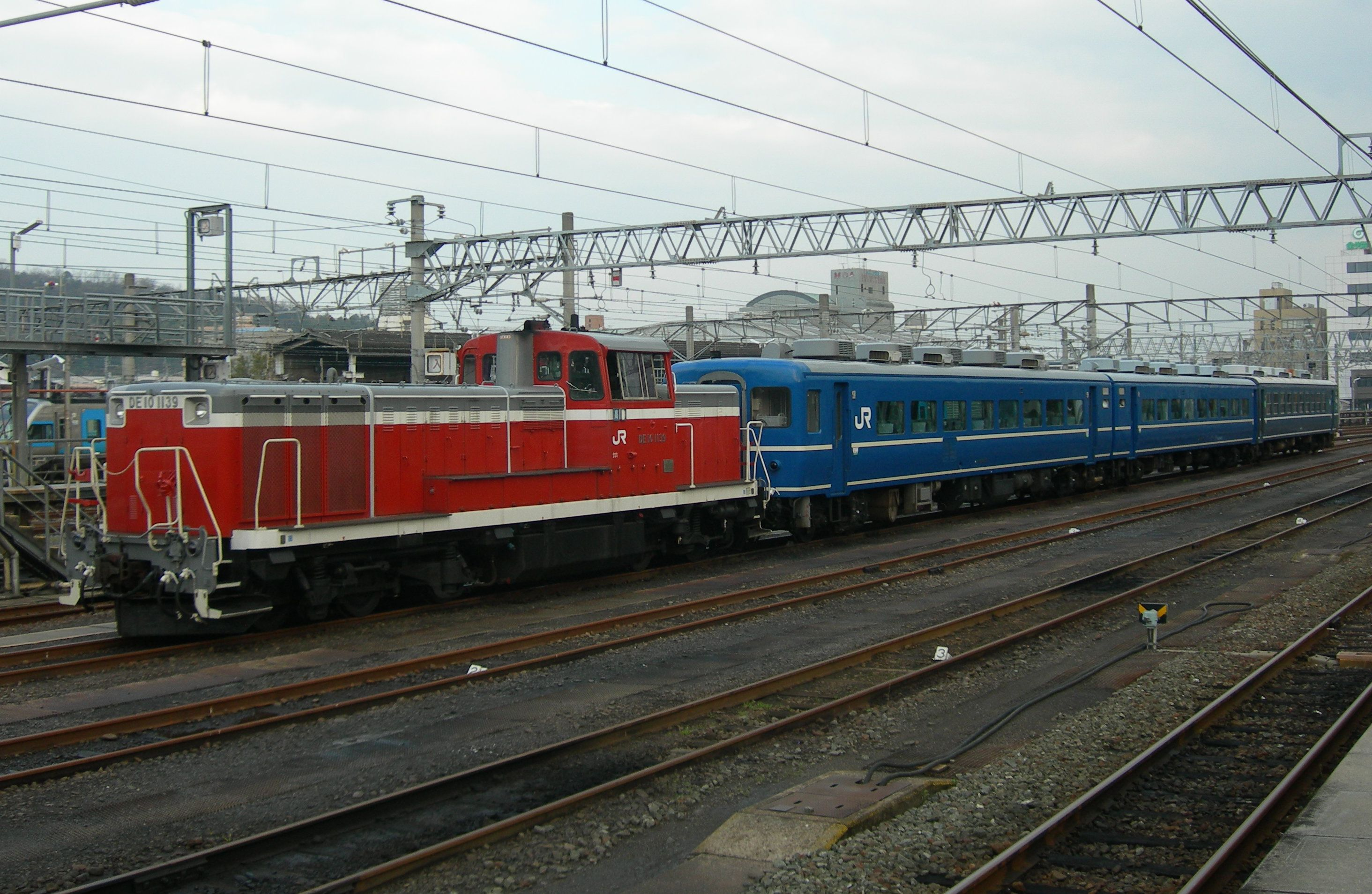 ムーンライト松山 松山駅で撮影